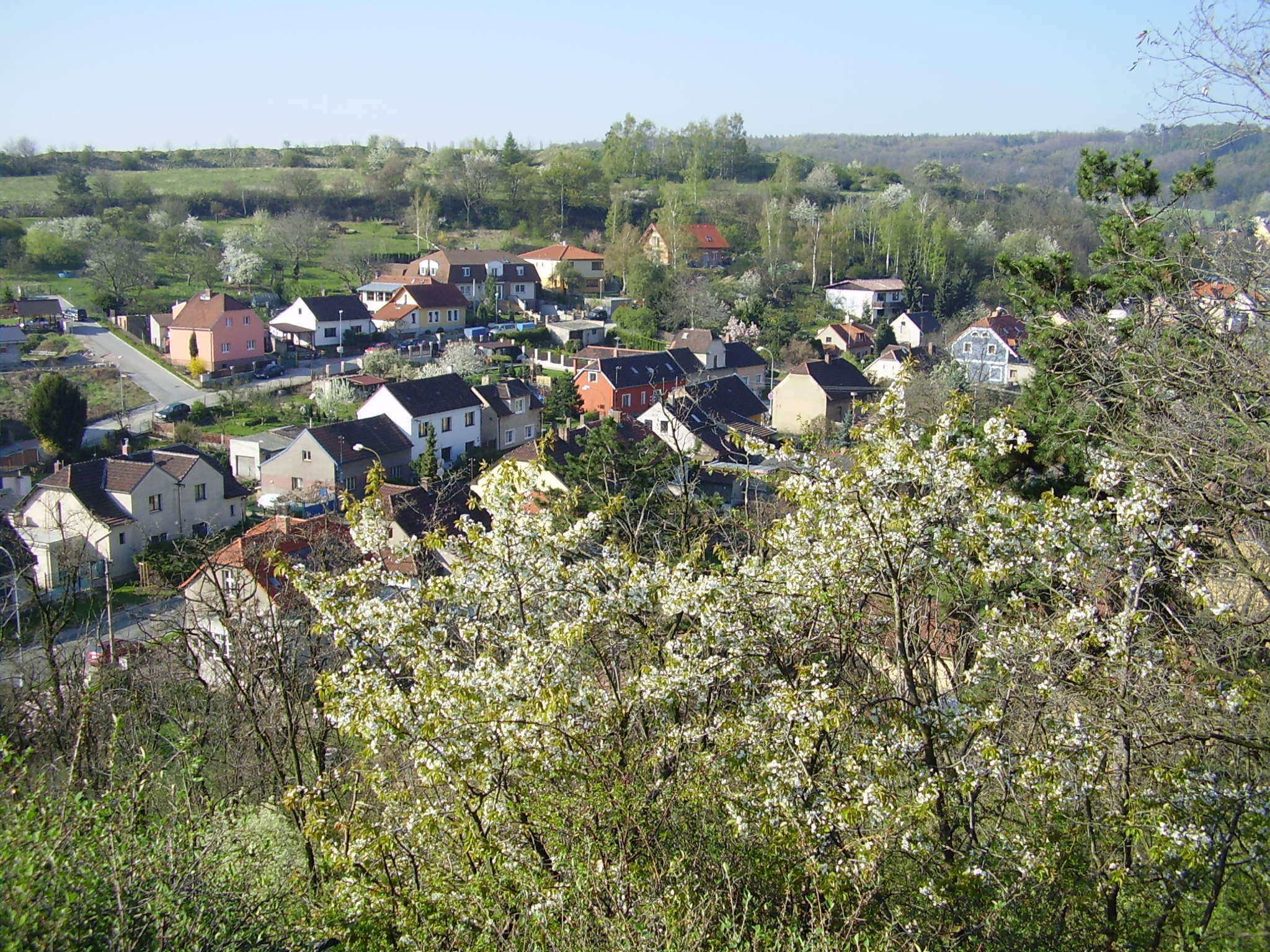 Chýnov - městská část Libčic n.Vlt